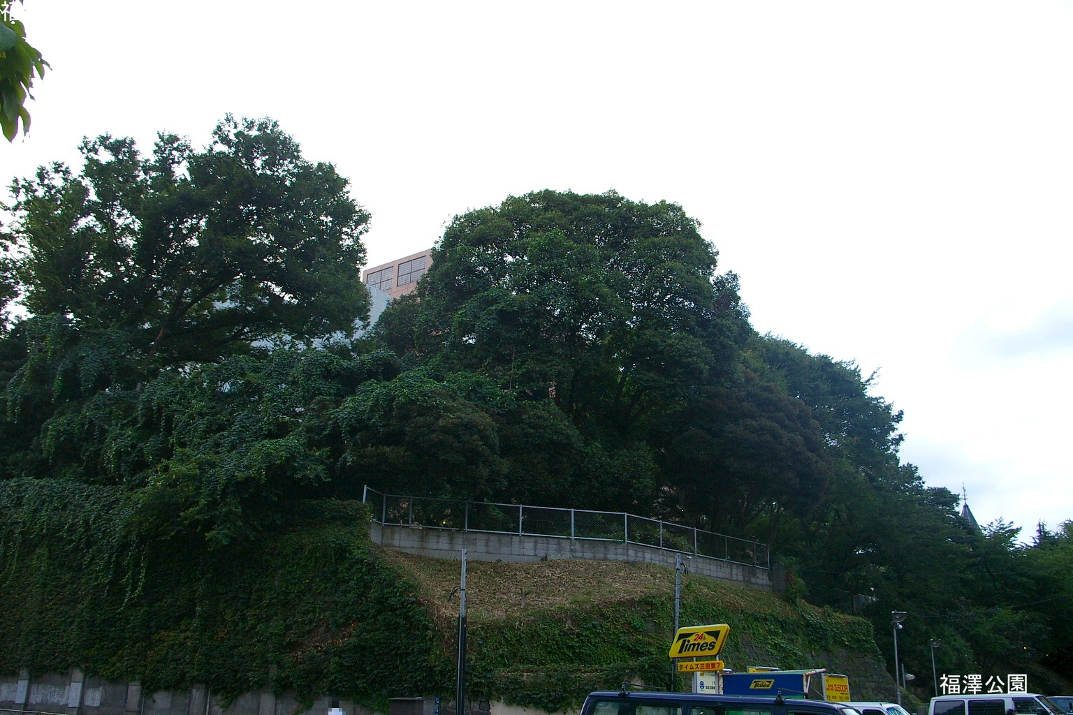 2009.5日本国内で塾生 (talk)が撮影。